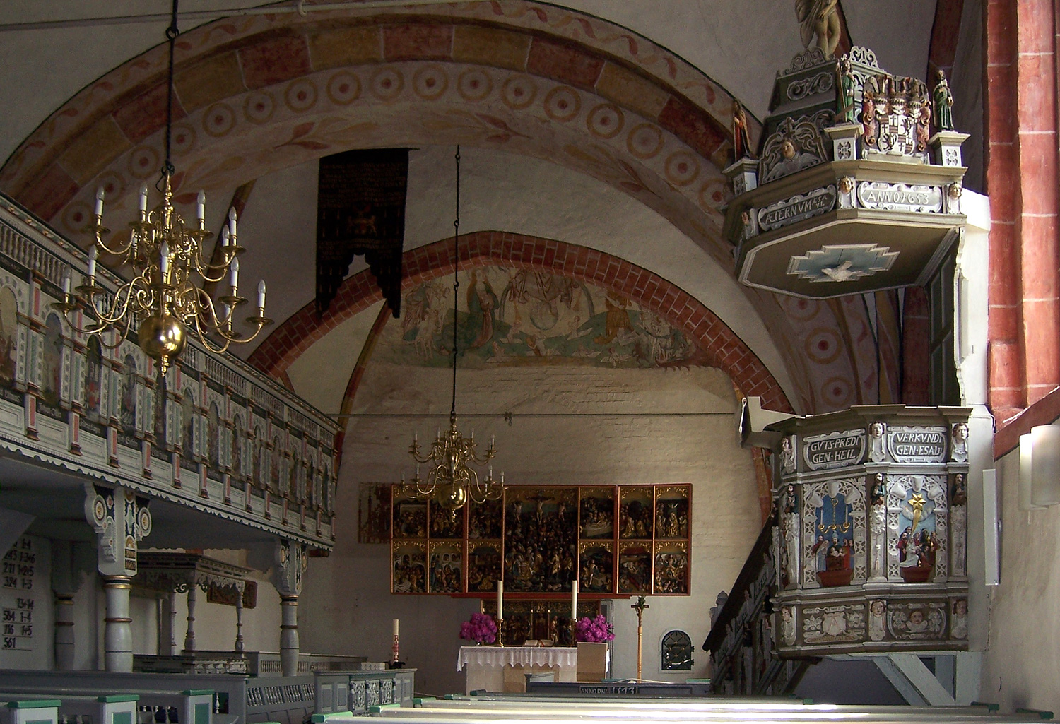 evangelisch-lutherische Pfarrkirche St. Johannes der Täufer in Bad Zwischenahn. Flügelaltar aus Eichenholz aus den Jahren 1520/25, vermutlich aus dem Osnabrücker Kreis. Die Kanzel stammt vom Tonnies Mahler (Schüler von Ludwig Münstermann) aus Leer und wurde 1653 gefertigt. 1662 wurde die Empore eingebaut und 1745 von Dierk Krüger aus Elmendorf bemalt. Fresko "Das Jüngste Gericht" über dem Altar im Chorgewölbe wurde 1512 gefertigt, 1904 vom Kirchenmaler Wilhelm Morisse freigelegt und restauriert. Quelle